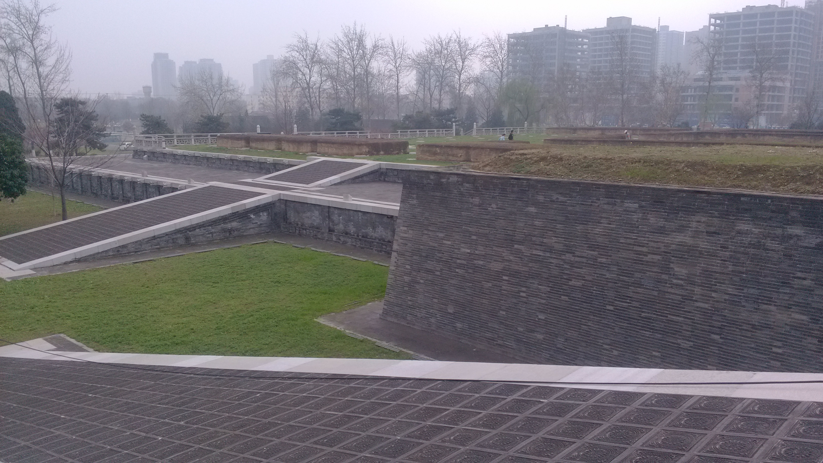 大明宫麟德殿遗址